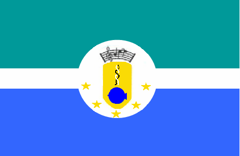 Bandera del Municipio Miranda (Zulia)